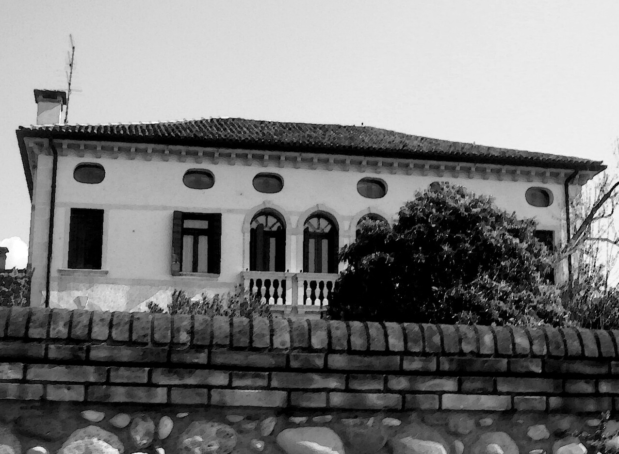 Ogliano di Conegliano (Treviso): Casino Piamonte (XVIII sec.).